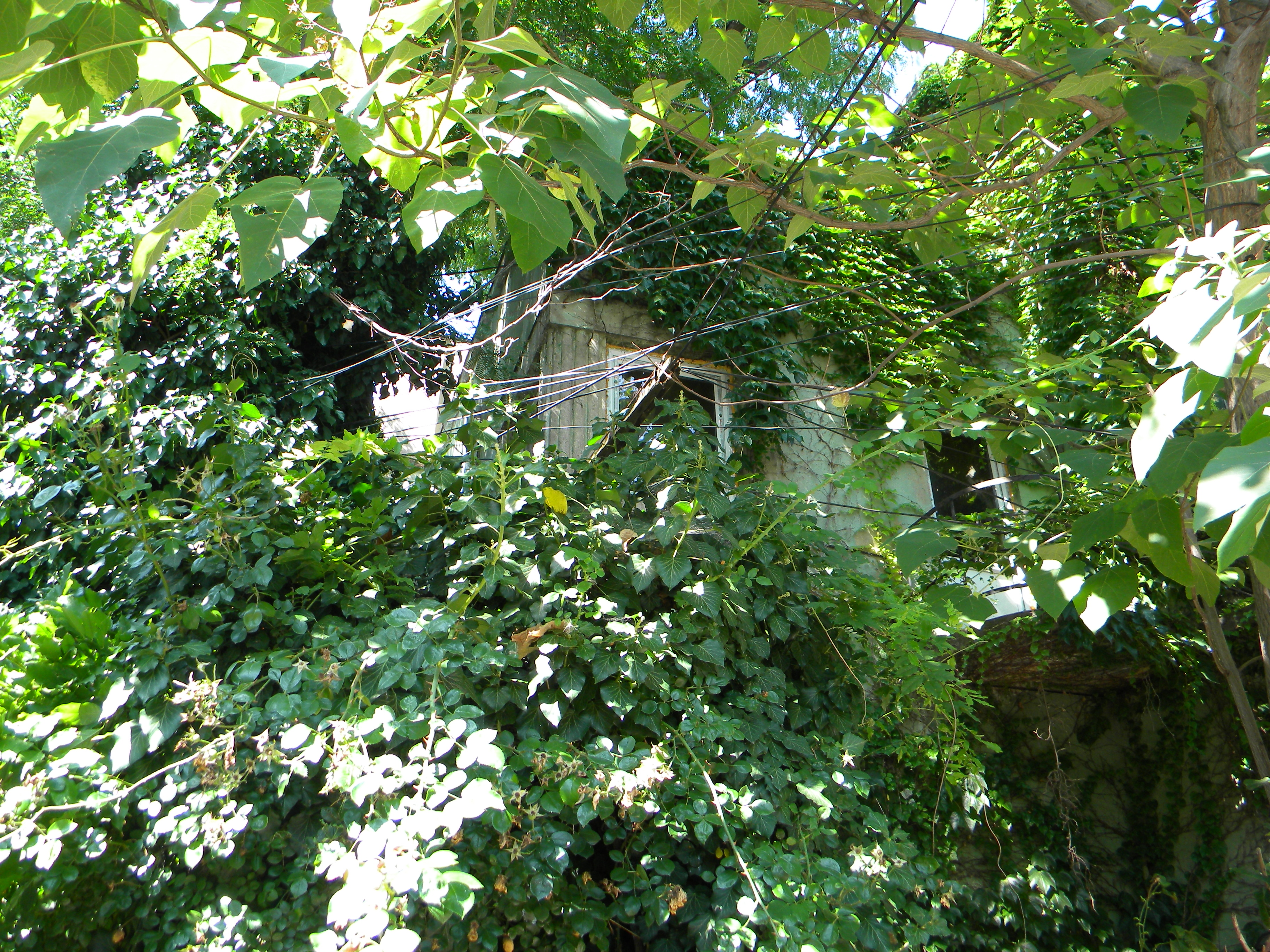 Bucuresti, Romania, Imobilul nr. 9 pe Str. Naum Ramniceanu; B-II-m-B-19528